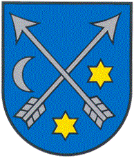 Герб м. Хуст